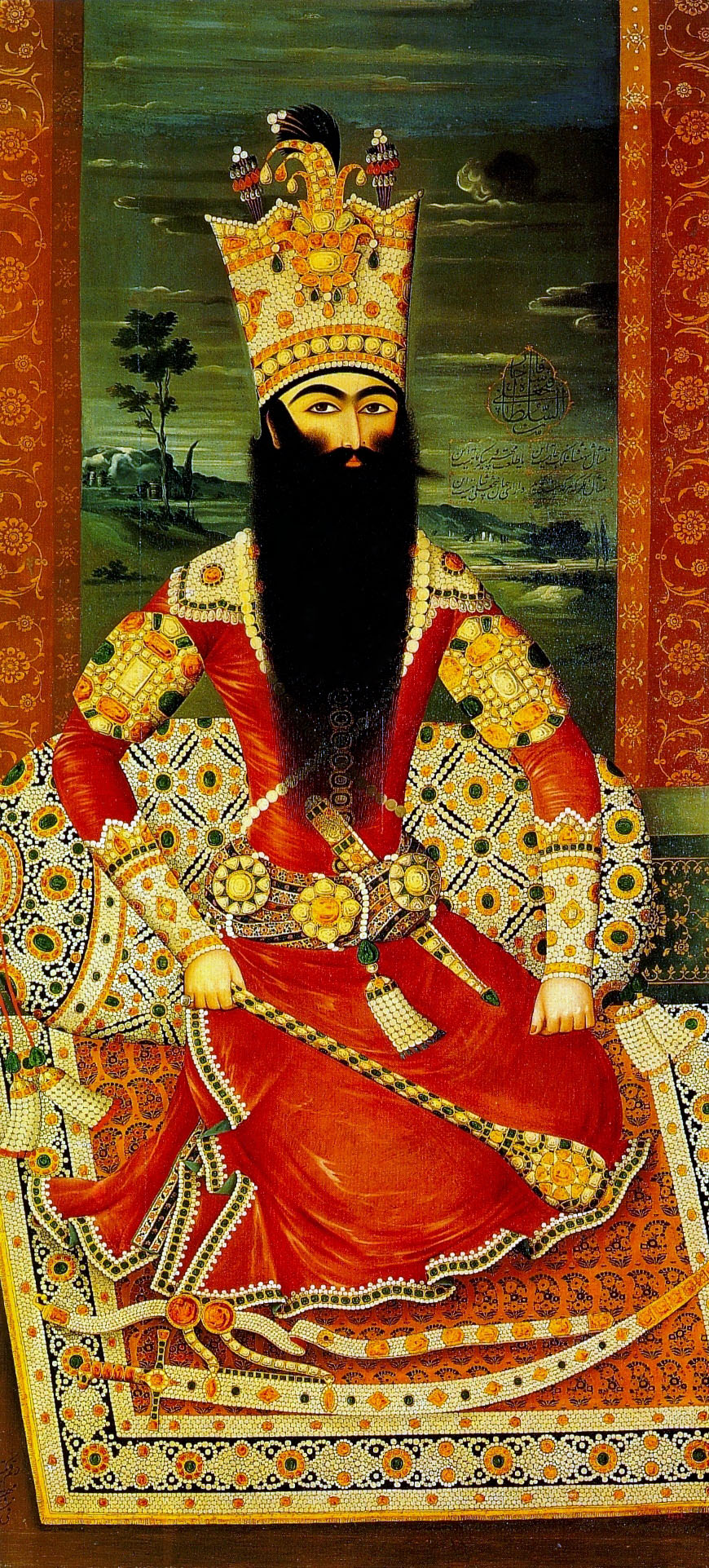 Михр Али Фатх Али-шах 1813-14 Эрмитаж